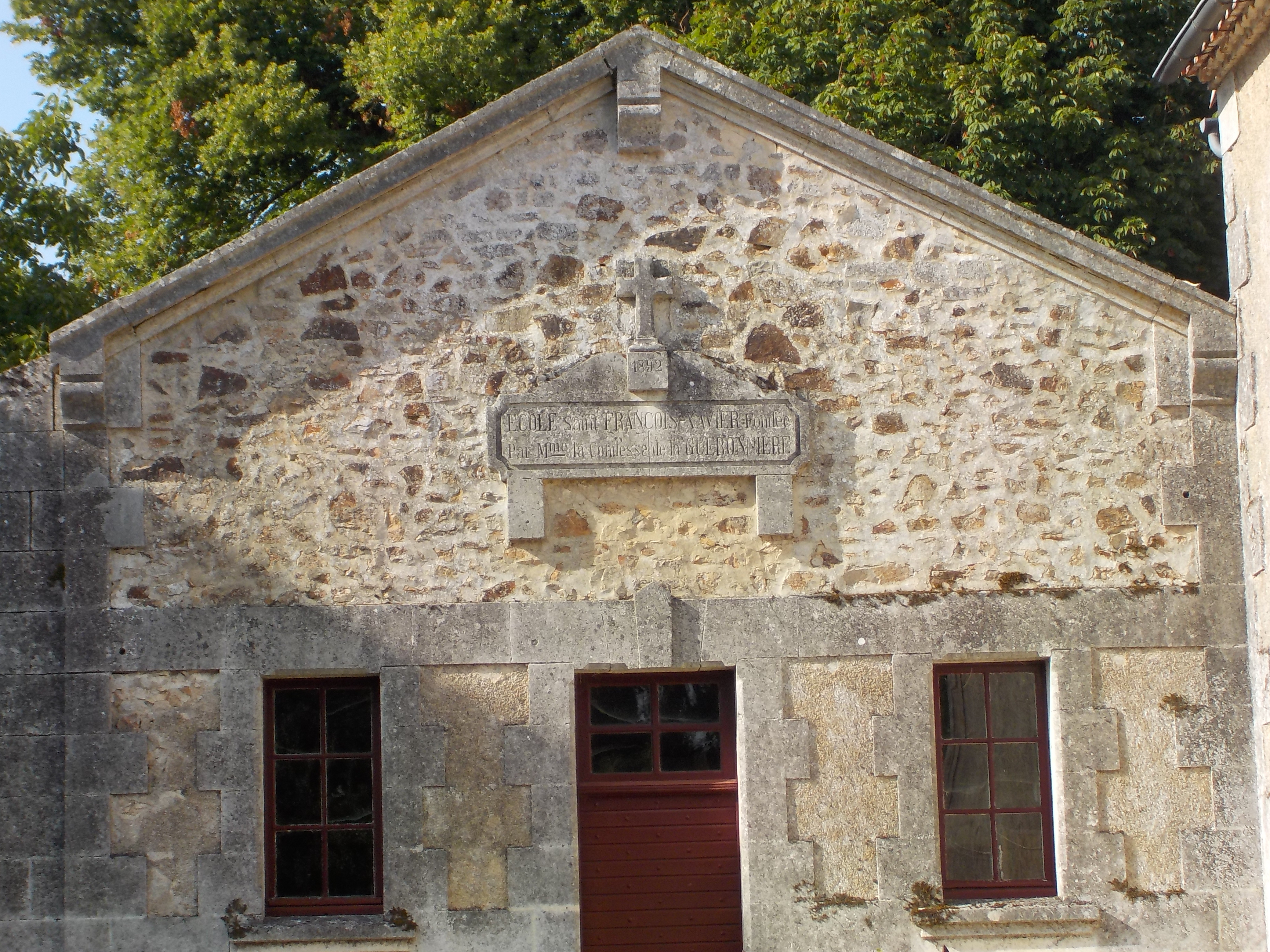 massignac ecole st francois xavier